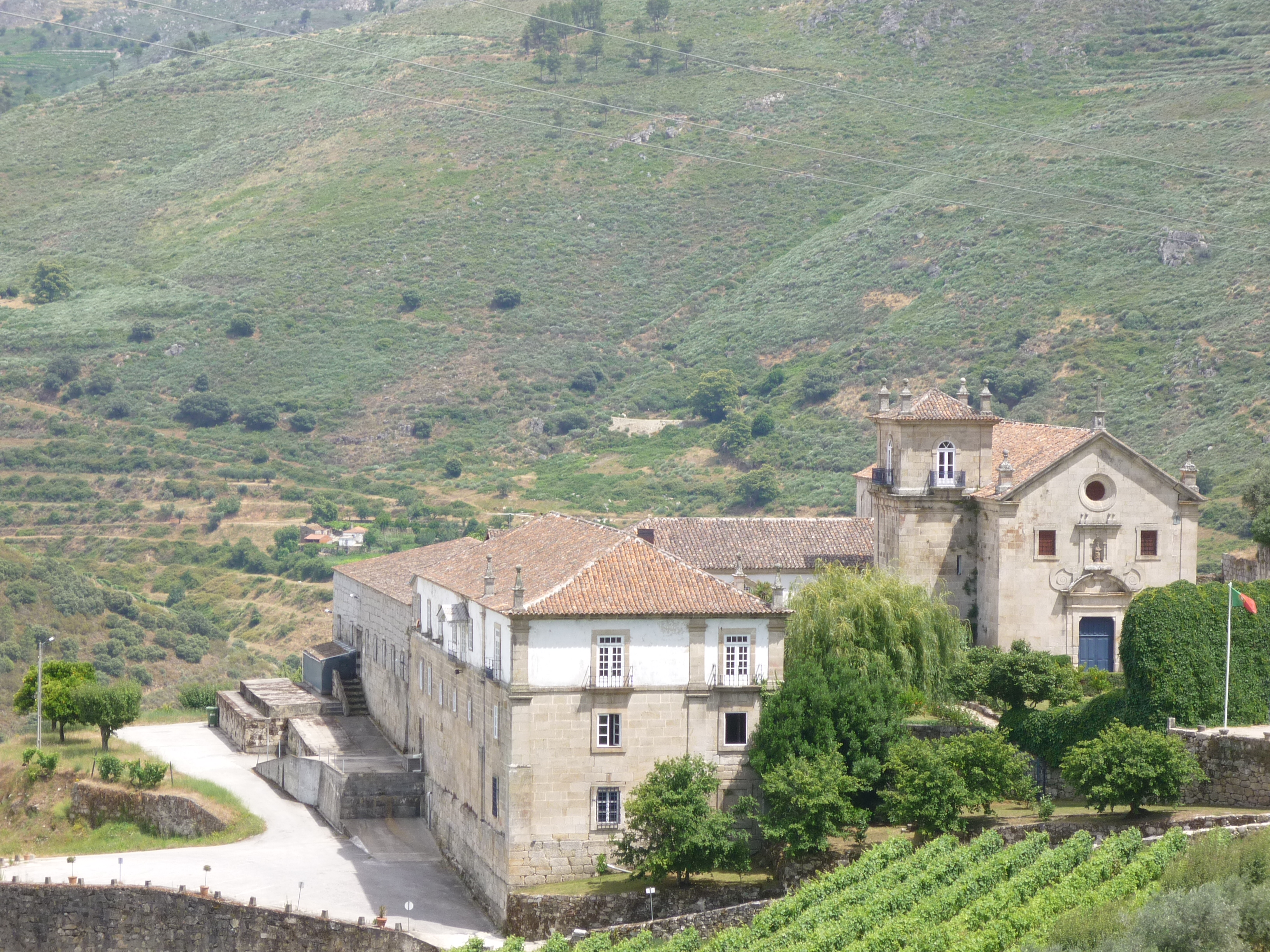 ehem. Kloster Sao Pedro das Aguias